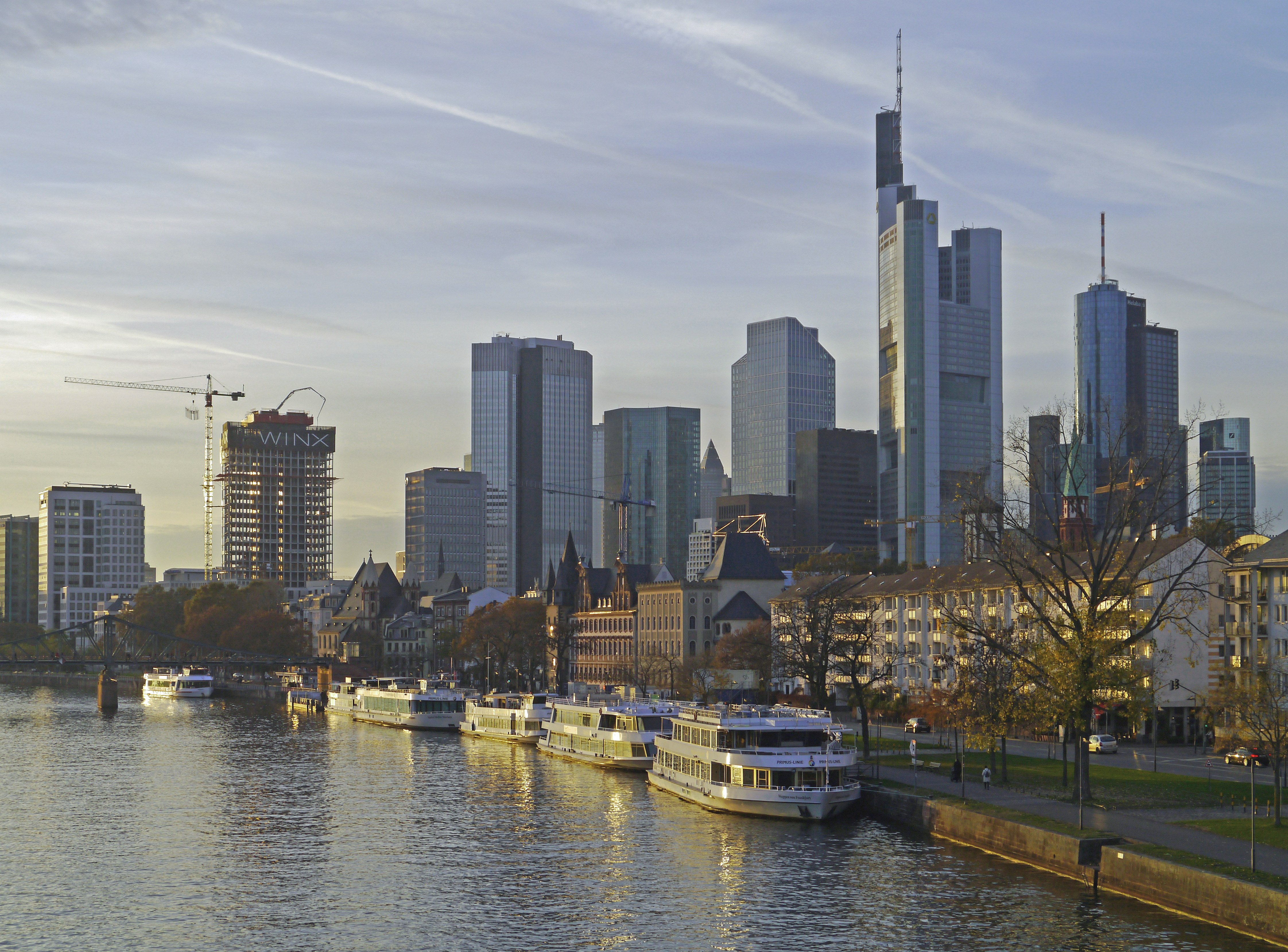 Die Weisse Flotte am Mainkai in Frankfurt am Main, von der Alten Brücke aus gesehen.